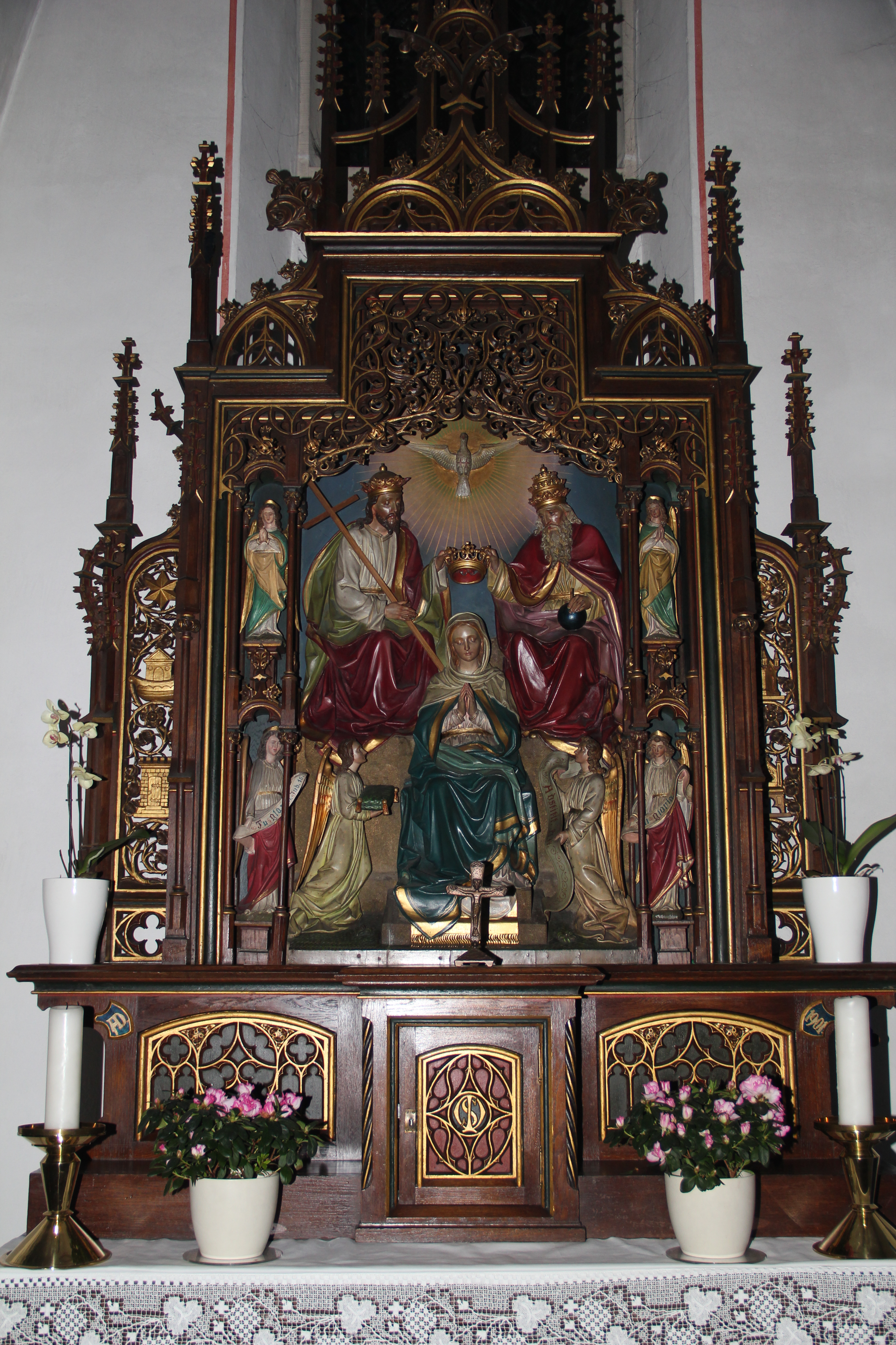 Rechter Seitenaltar in der Sankt-Jodokus-Kirche Wewelsburg